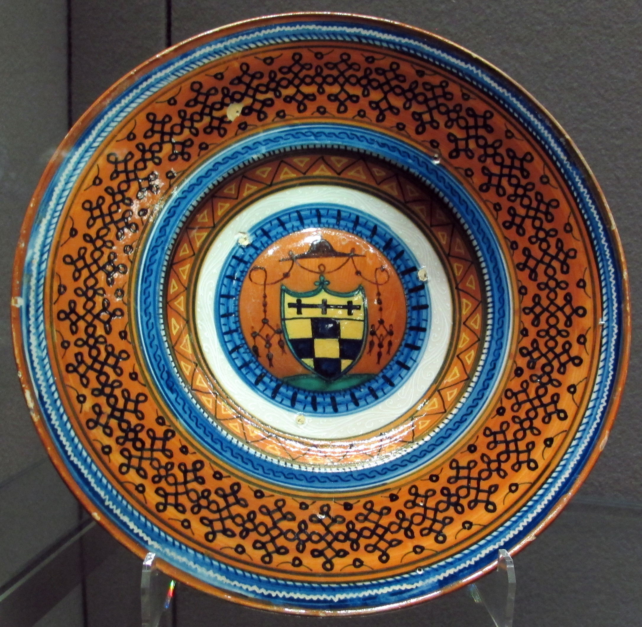 Maiolica in the Louvre